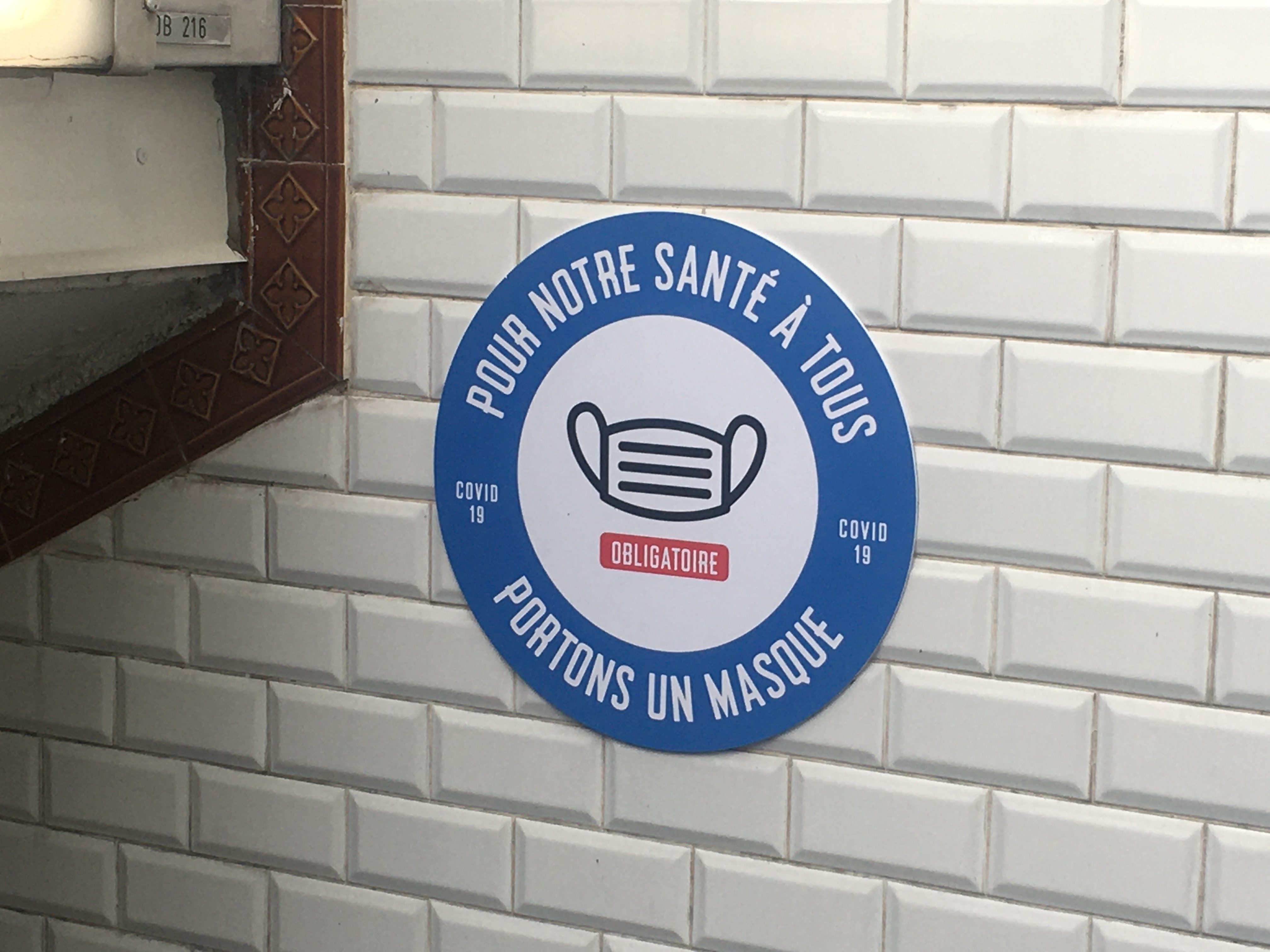 Panneau à l’entrée d’une station de métro parisien installé à l’occasion du déconfinement pendant la pandémie de Covid-19